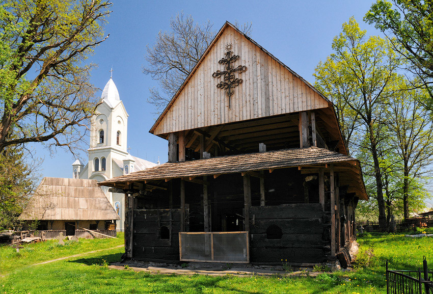 Церква Різдва Богородиці у Стеблівці. Мармароська готика один з 5 вцілілих храмів в Україні сильно постраждала від пожежі 1994 р. Законсервована у 2010 р.